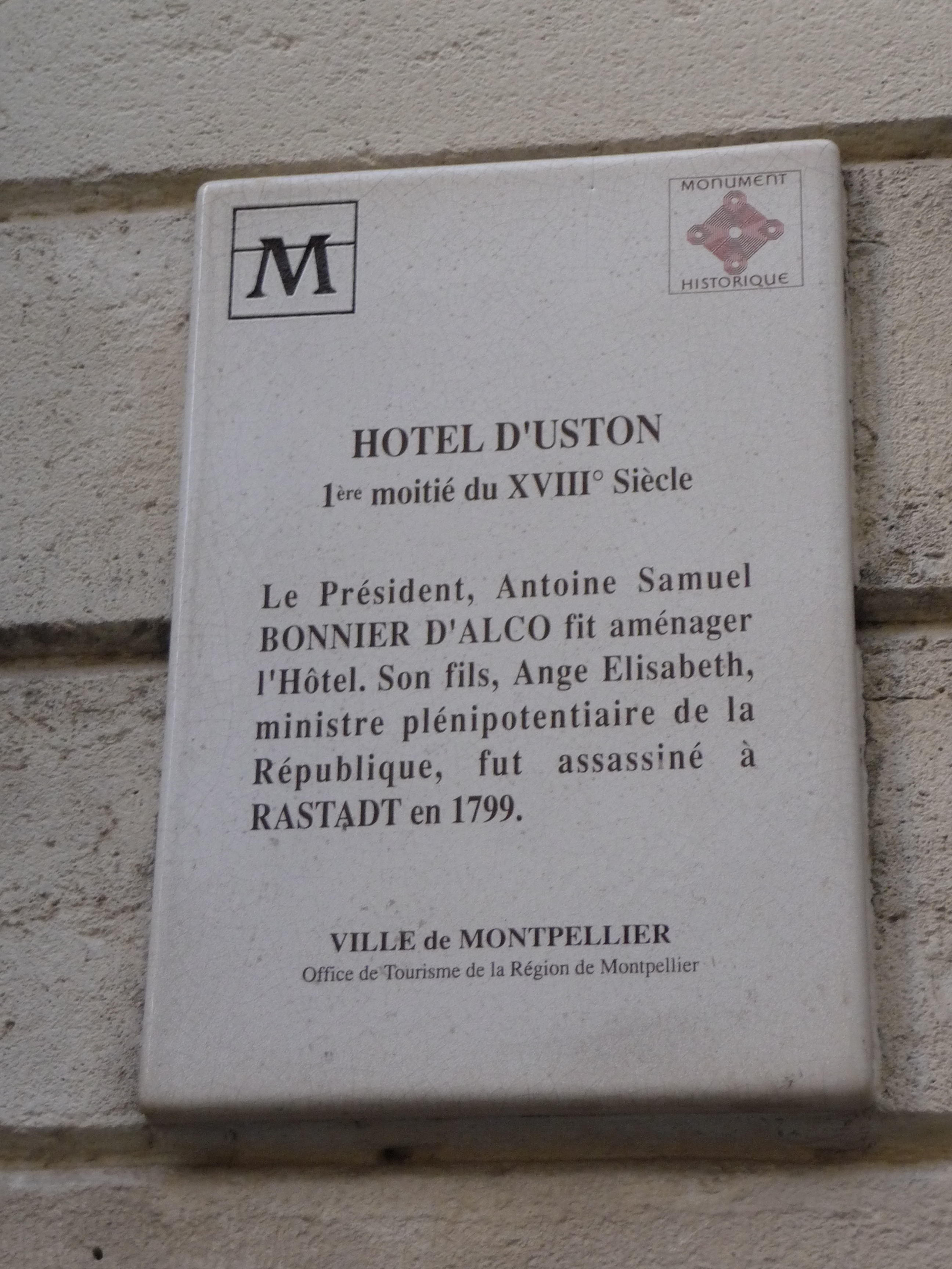 Hôtel d'Uston (Montpeller) .